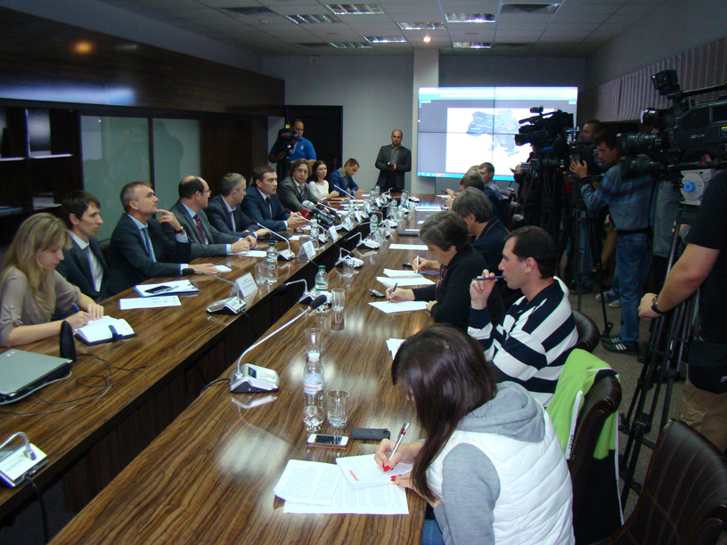 Презентація нових електронних послуг у сфері земельних відносин. Держгеокадастр, 05.10.2015